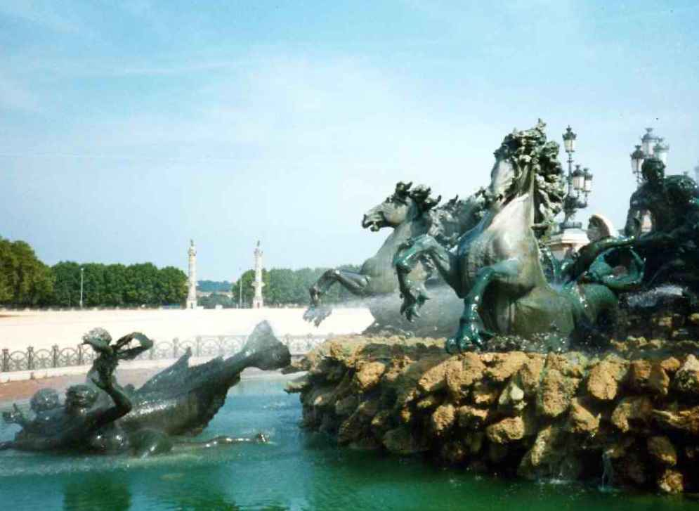 Michel BUZE